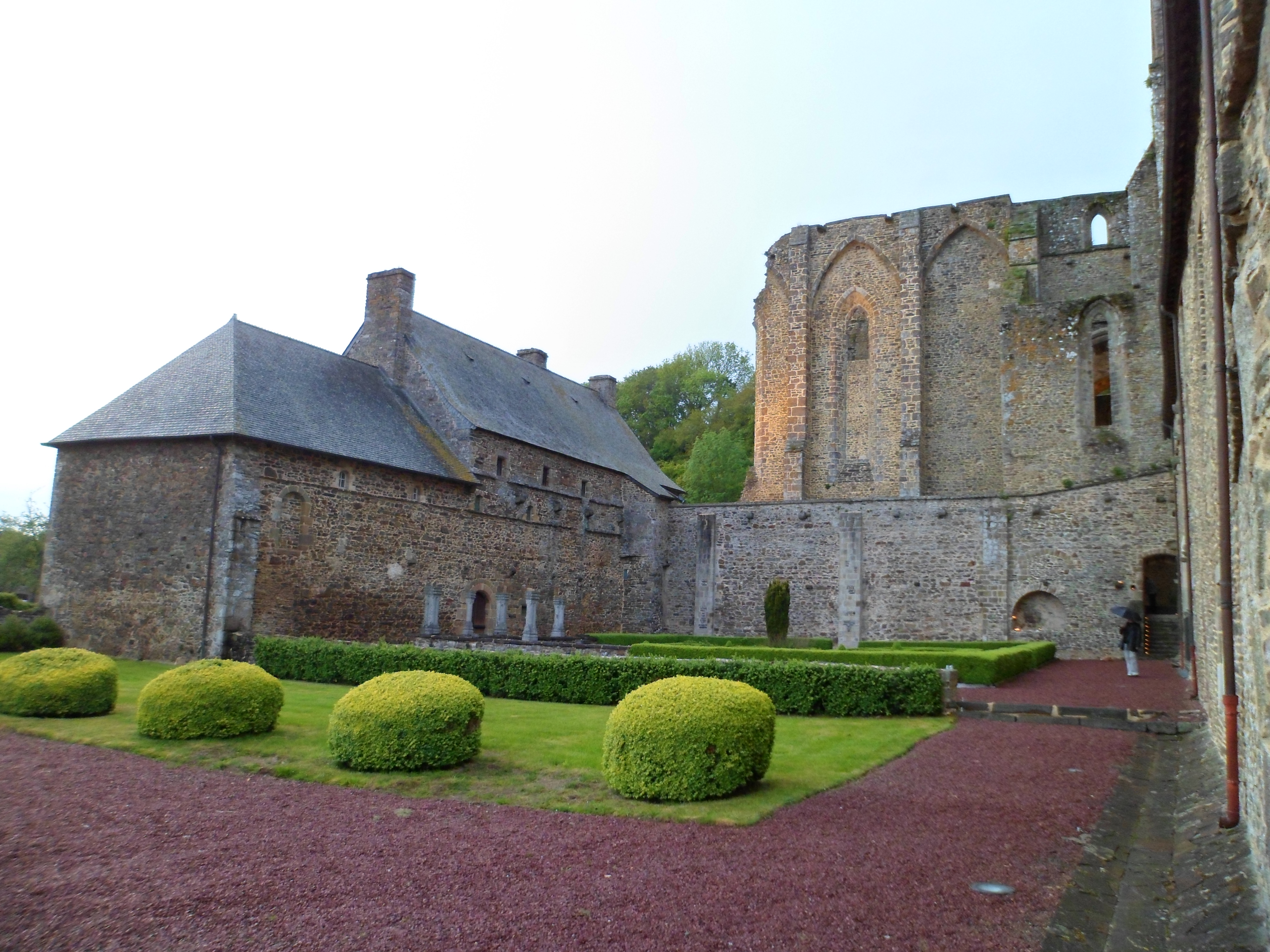 Abbaye de Hambye, ouvert dans le cadre de l'opération Pierres en lumière 2012